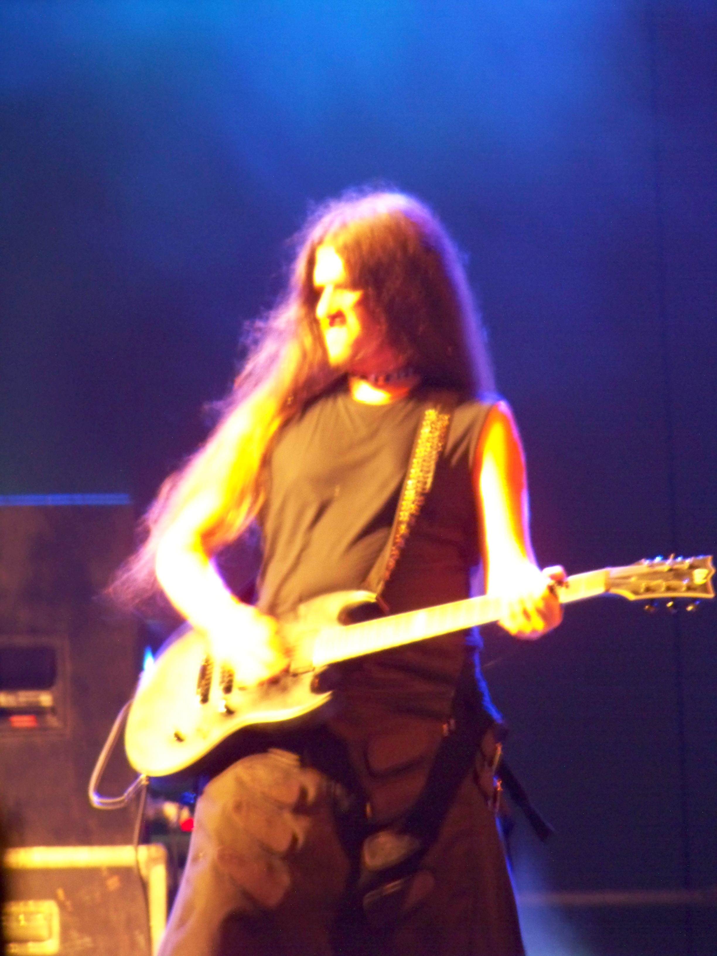 Pepe Herrero junto a su banda Stravaganzza en un concierto en la Feria de Málaga